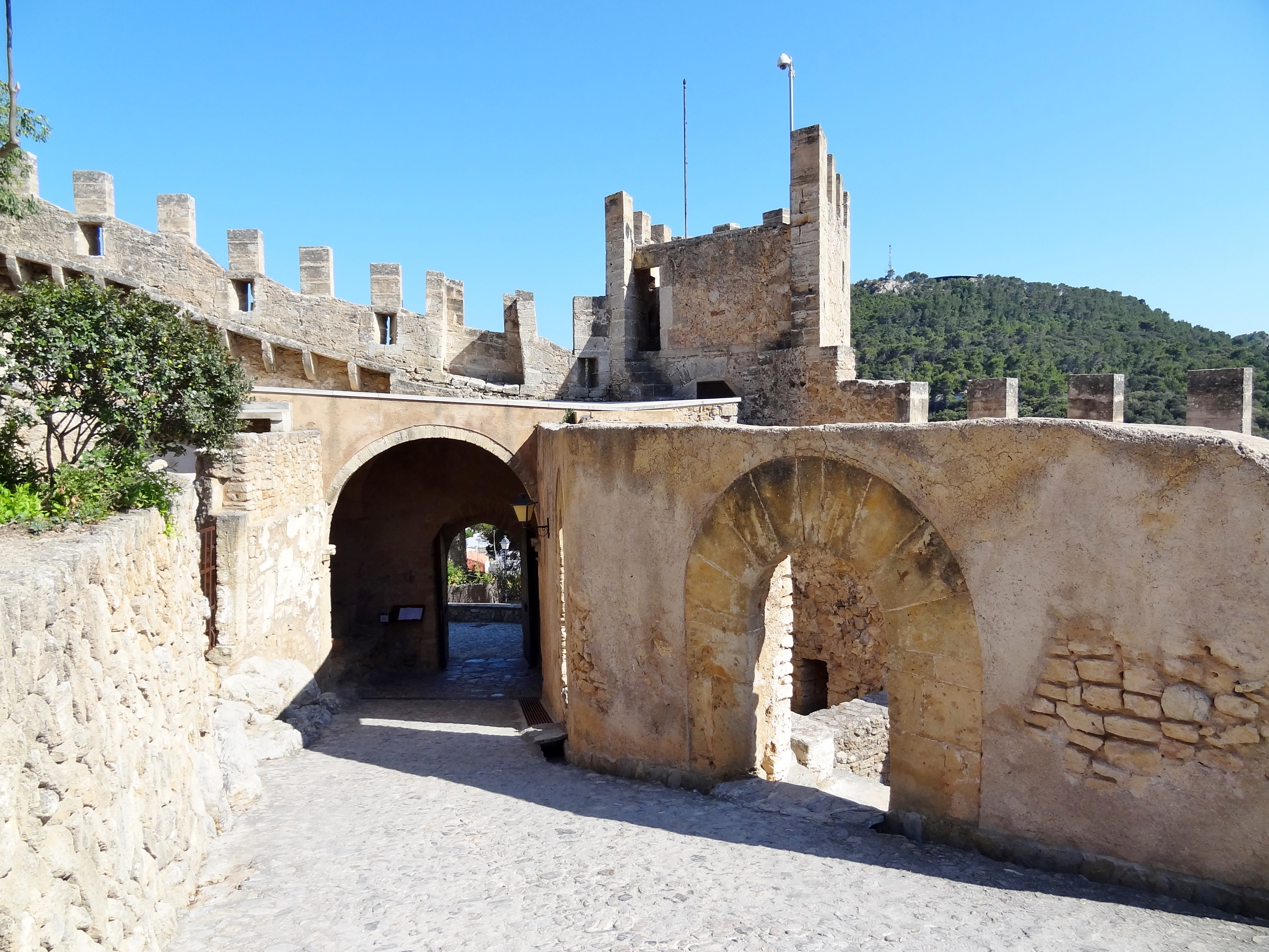 Castell de Capdepera, Gemeinde Capdepera, Mallorca, Spanien